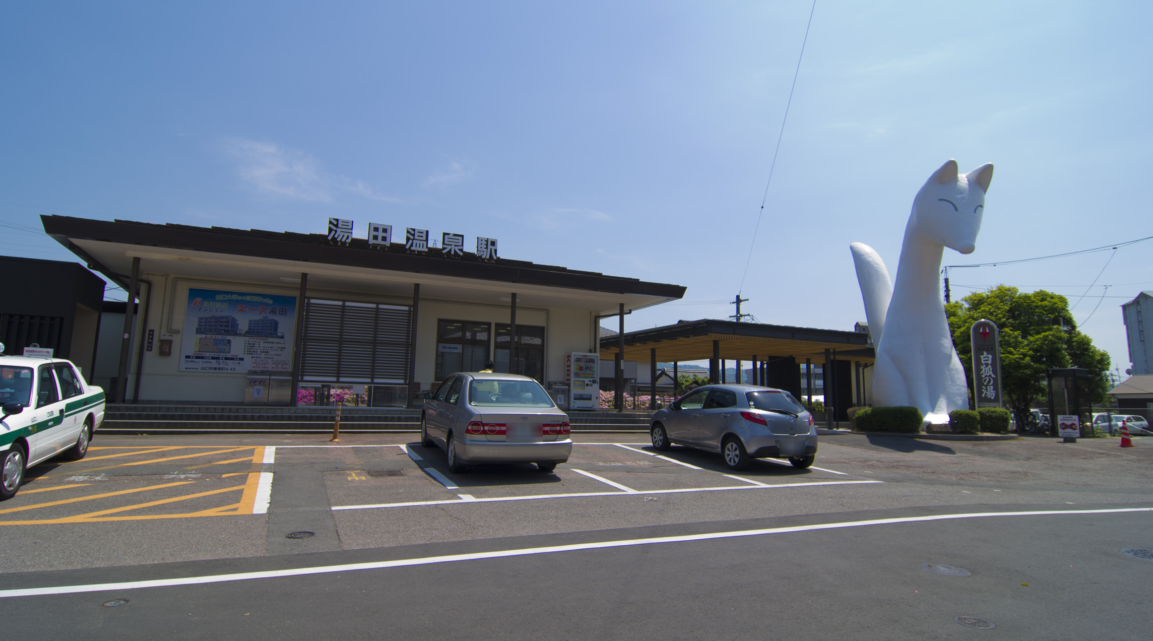 西日本旅客鉄道山口線湯田温泉駅